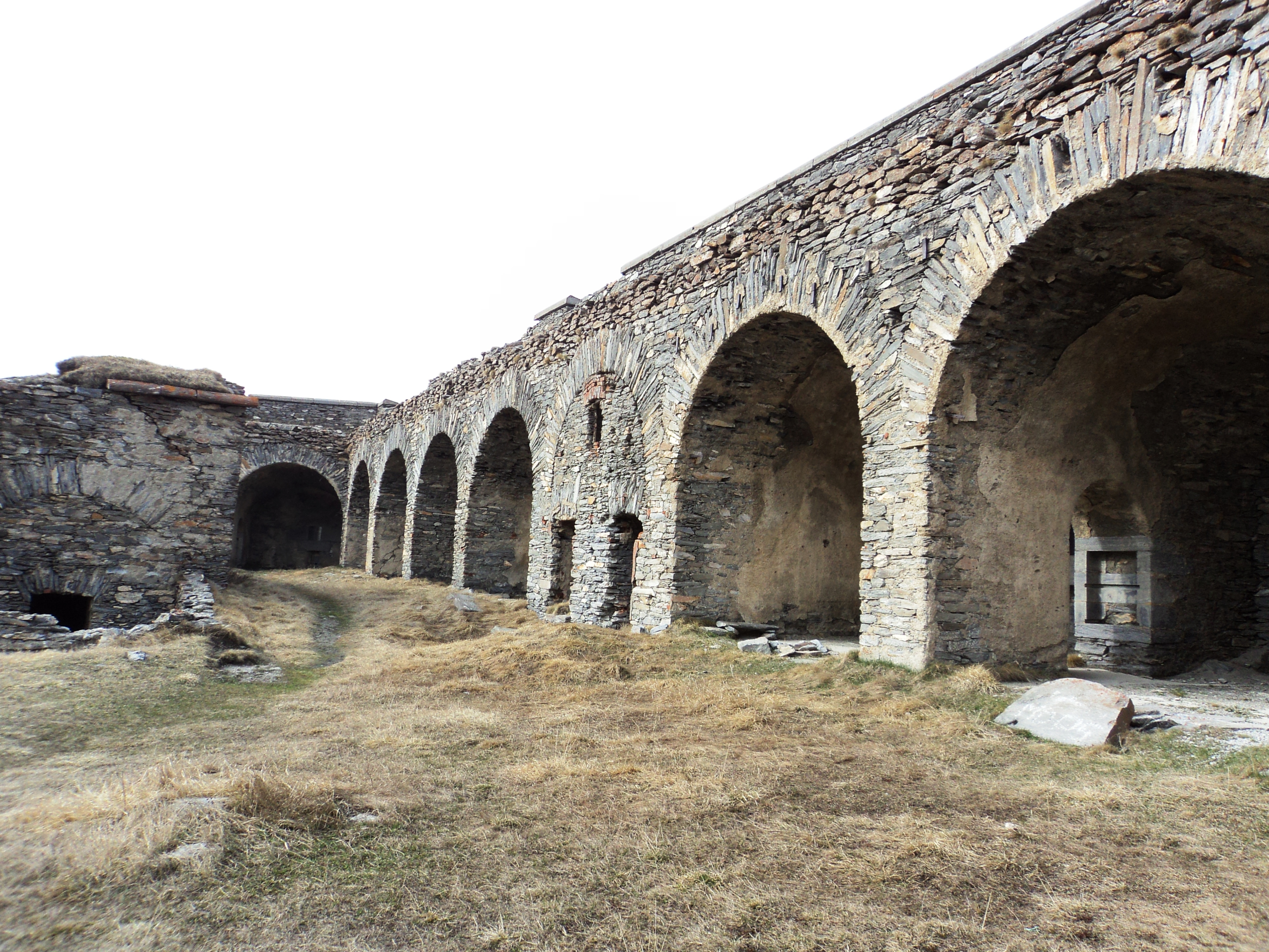 Interno del Forte Varisello - Colle del Moncenisio - Francia